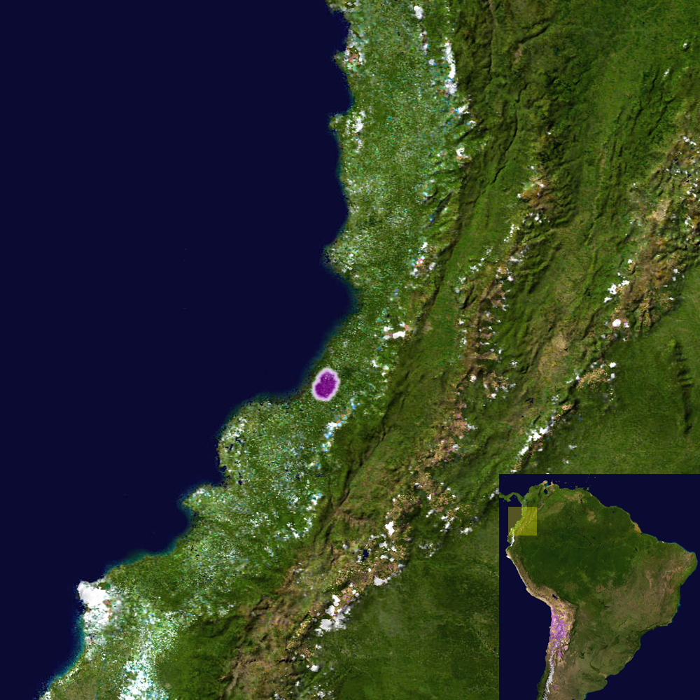 Distribution of Phyllobates terribilis Note: Image unusable for people with red-green blindness. Use e.g. yellow or blackish shading to indicate range, not red.